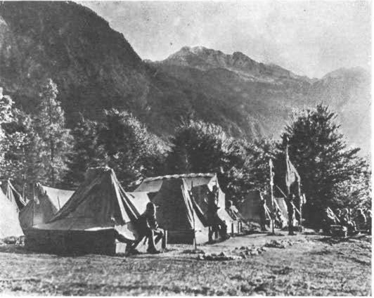 Skavtski tabor v Bohinju.